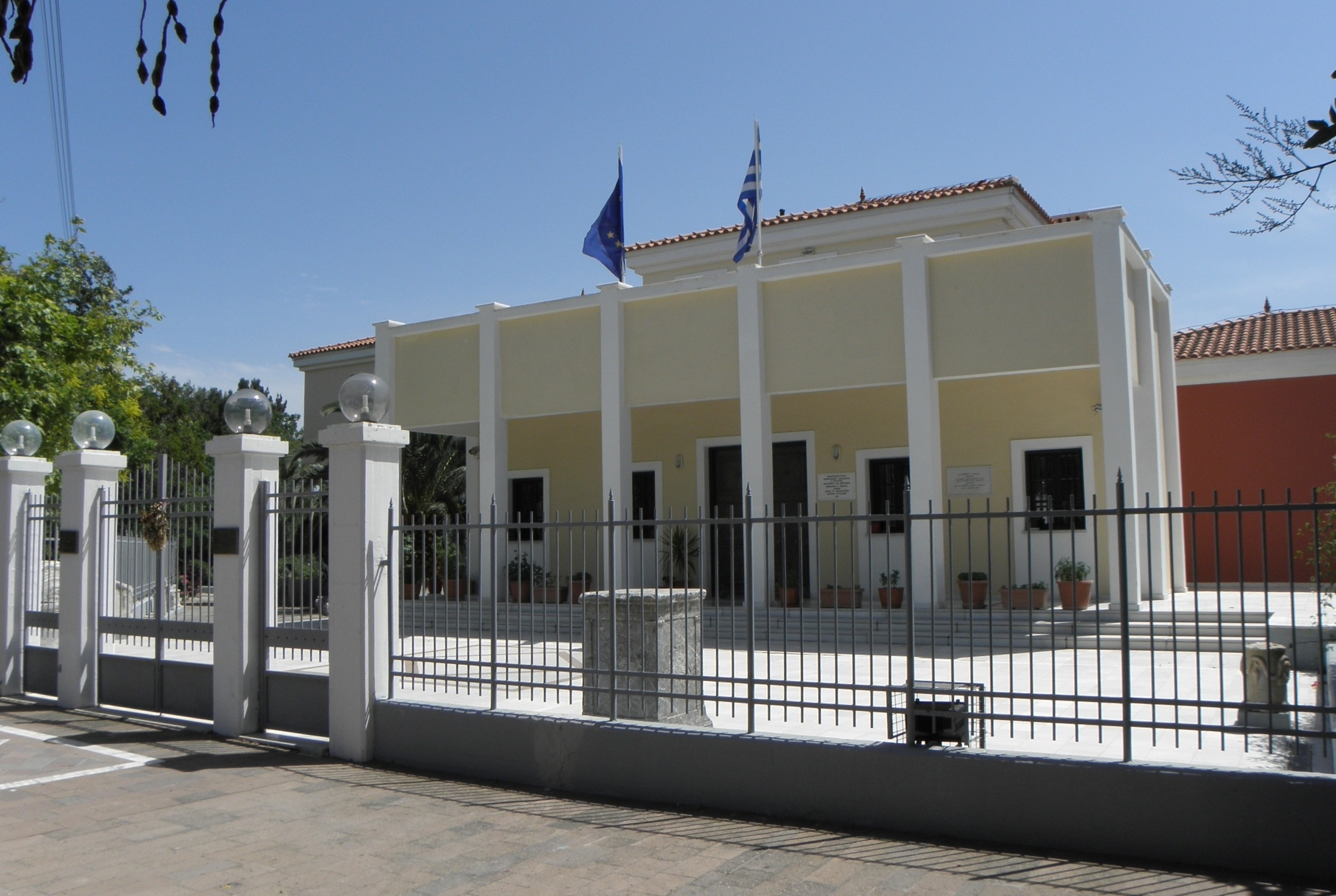 Nová budova Archeologického muzea v Mytiléně, Lesbos